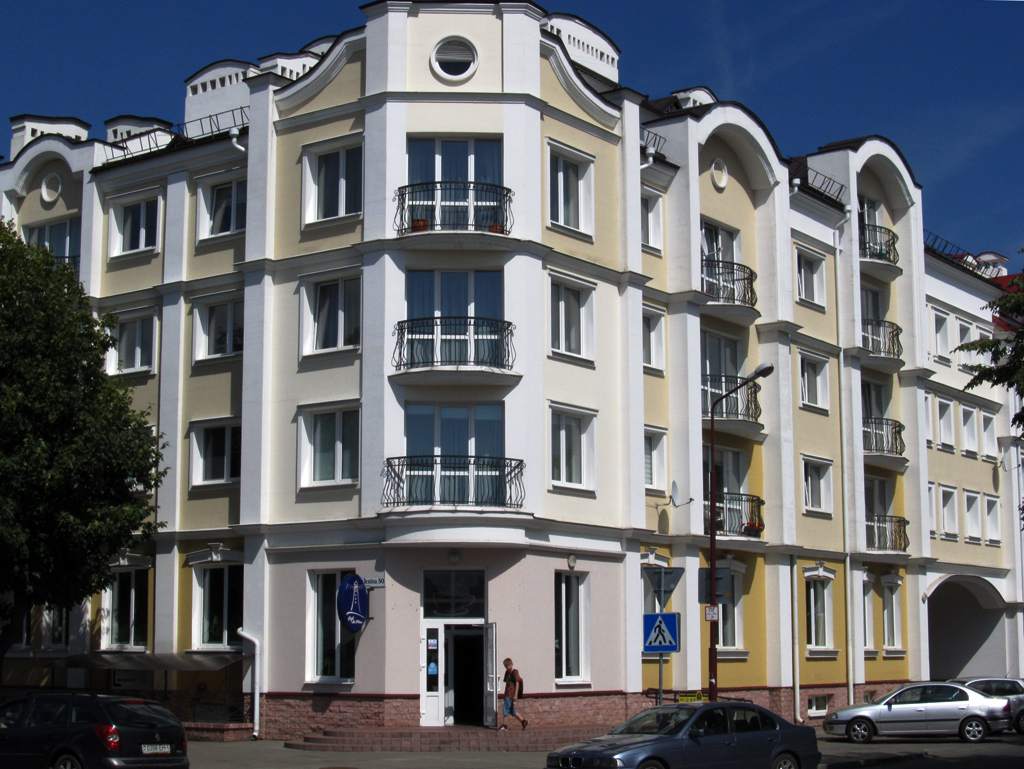 Брэст. Вуліца Леніна, 50